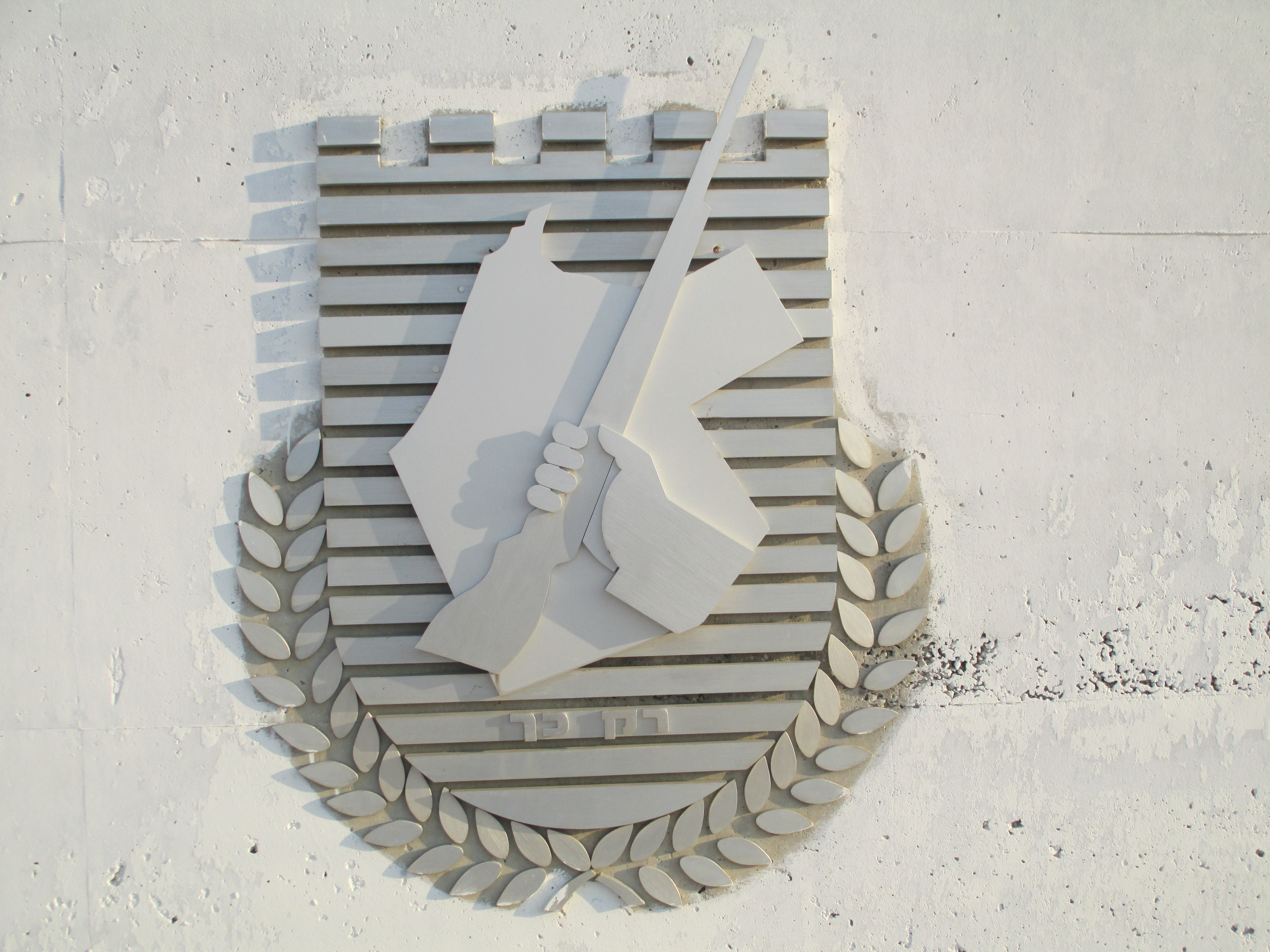 סמל אצ"ל באנדרטת אצ"ל ברמלה